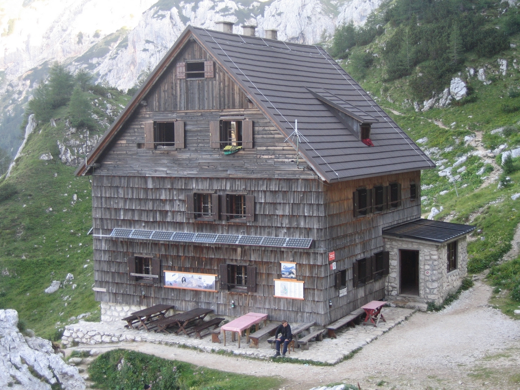 Vodnikov dom na Velem polju.jpg